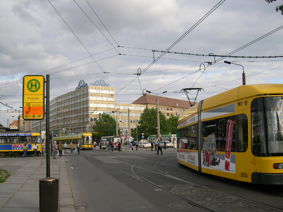 Haltestelle für Bus und Straßenbahn am Dresdner Postplatz (2004) vor der Umgestaltung des Platzes im Jahr 2007 (der jetzige Haltestellenbereich befindet sich im Hintergrund beim "Linde"-Gebäude)